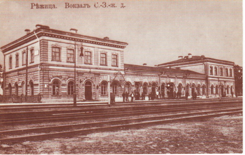 Dzelzceļa stacija Rēzekne I laika posmā no 1906. līdz 1909. gadam